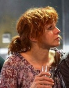 Ónodi Eszter magyar színésznő.